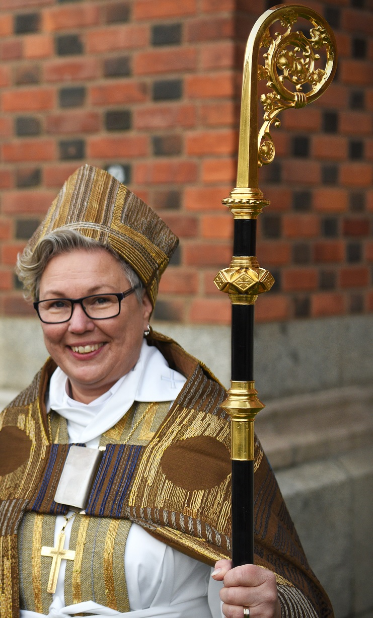 Svenska kyrkans nya biskop i Härnösands stift, Eva Nordung Byström. Biskopsvigningen ägde rum i Uppsala domkyrka på tredje söndagen i Advent, den 14 december 2014.